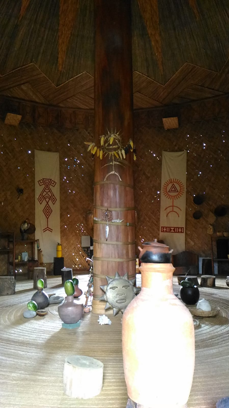 Interior do Templo do Sol en Sogamoso.